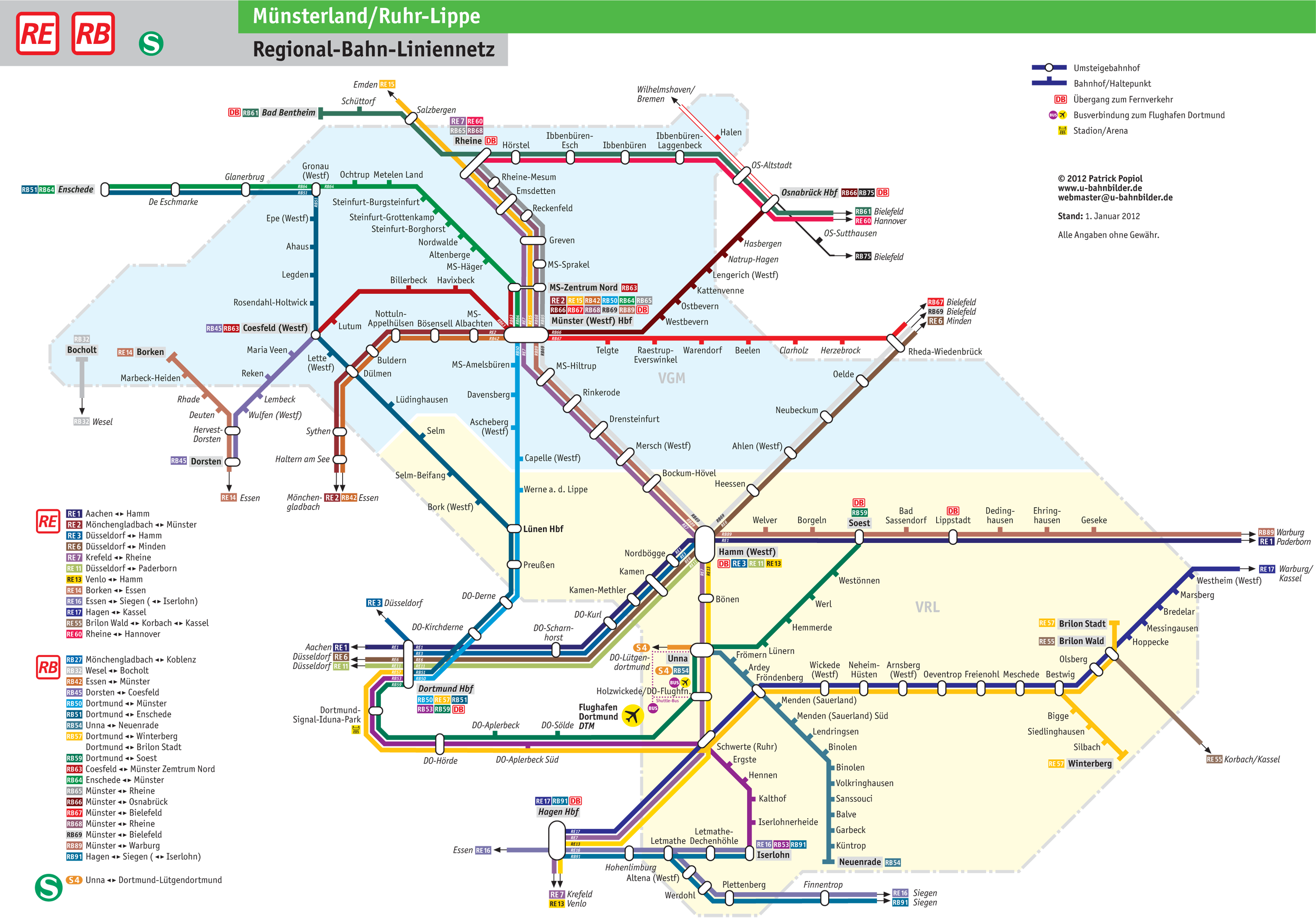 Schematische Darstellung des VRL-Linien-Netzes